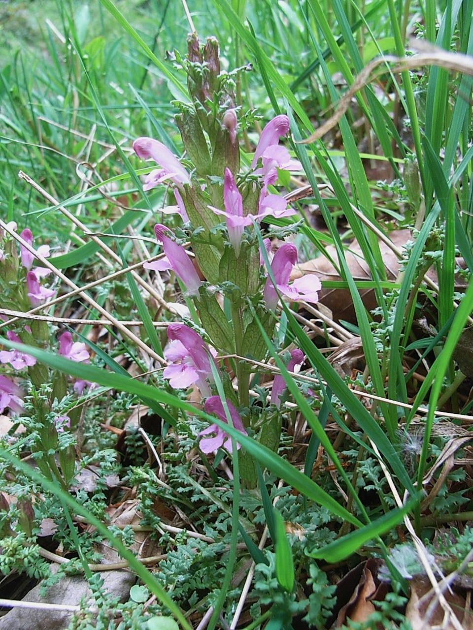 Wald-Läusekraut, Bayerischer Wald